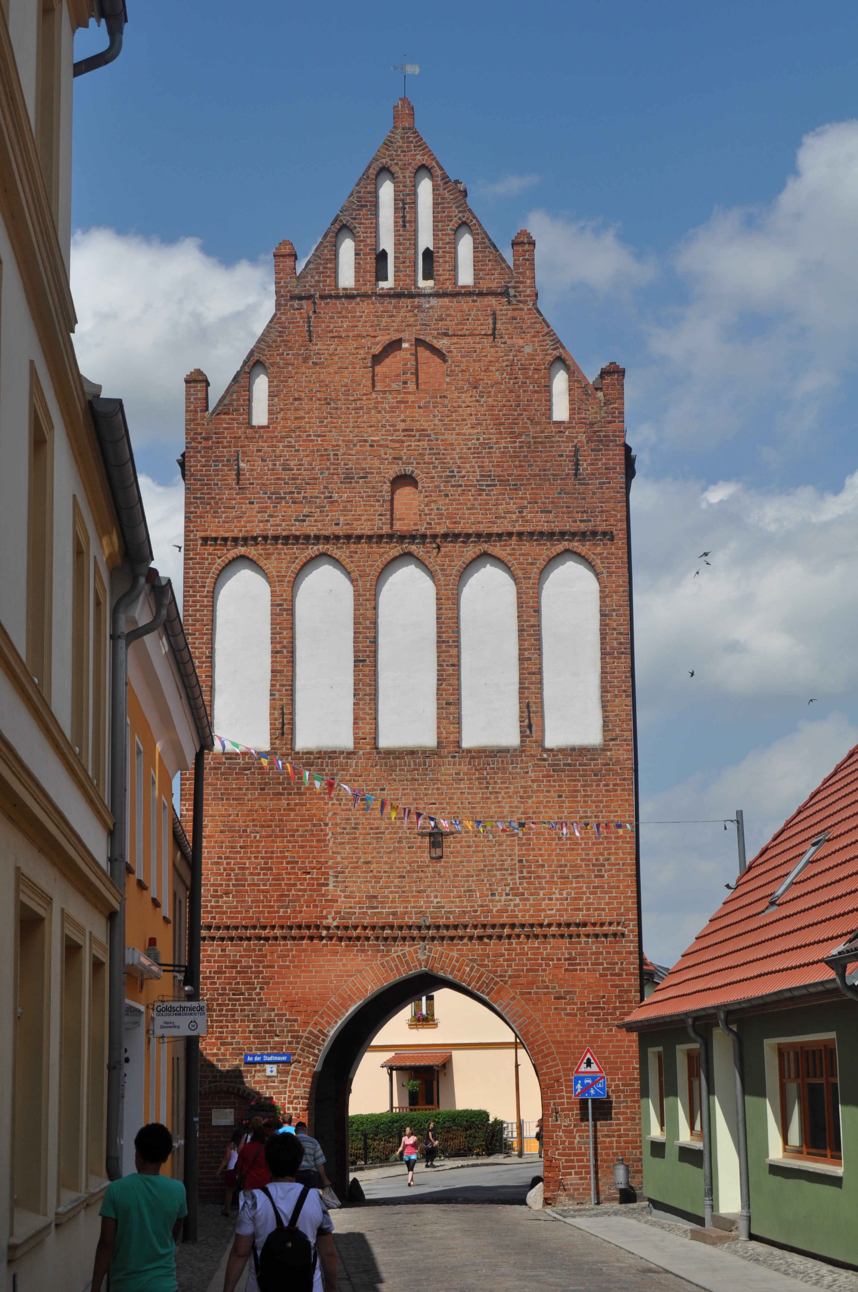 Stralsunder Tor Grimmen - Stadtseite